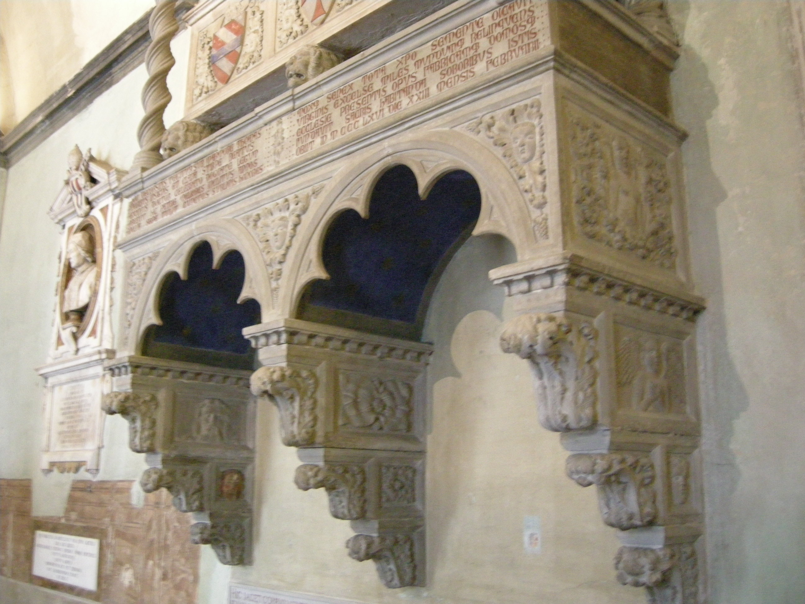 Santo spirito, cappella corsini, tomba di tommaso corsini